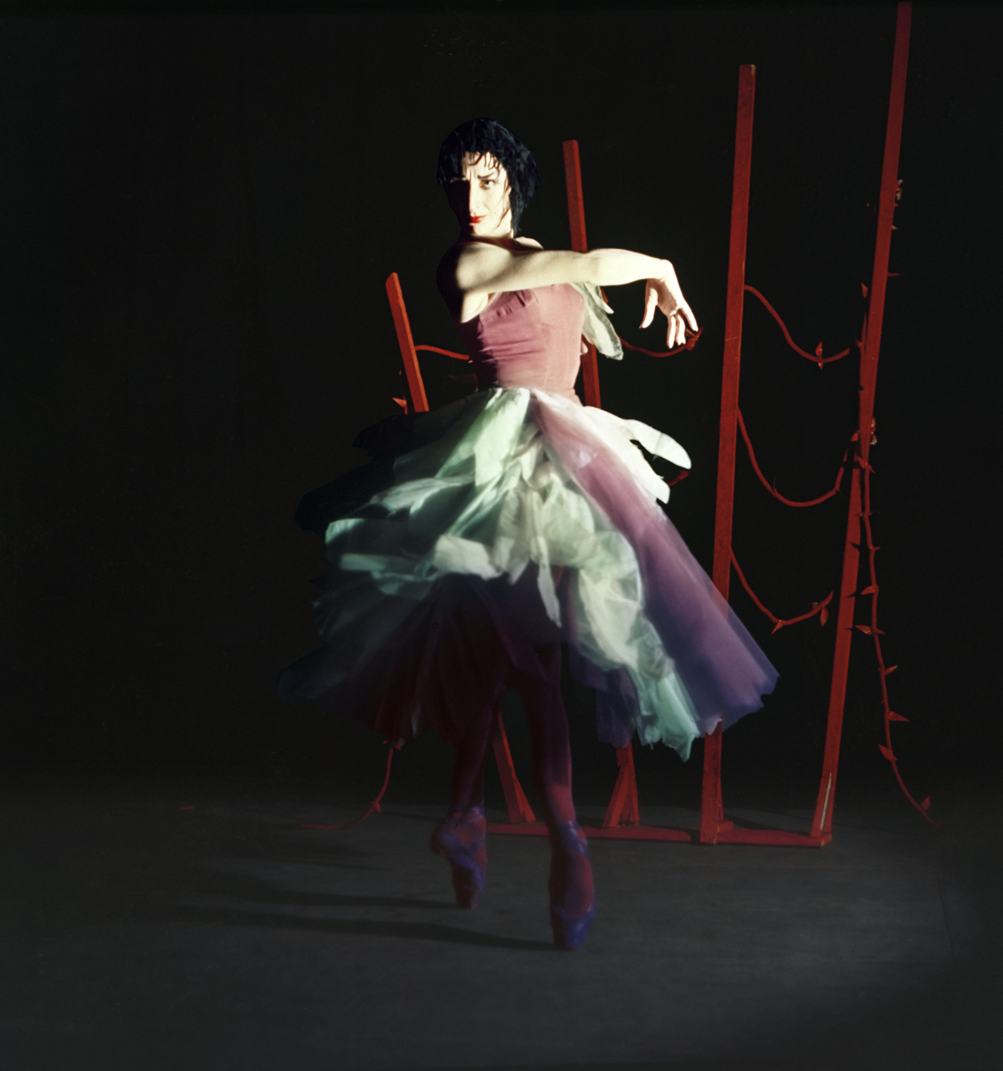 Lia Dell'Ara nel ruolo dell'Angoscia nel balletto "Sonata dell'Angoscia" di Bela Bartok